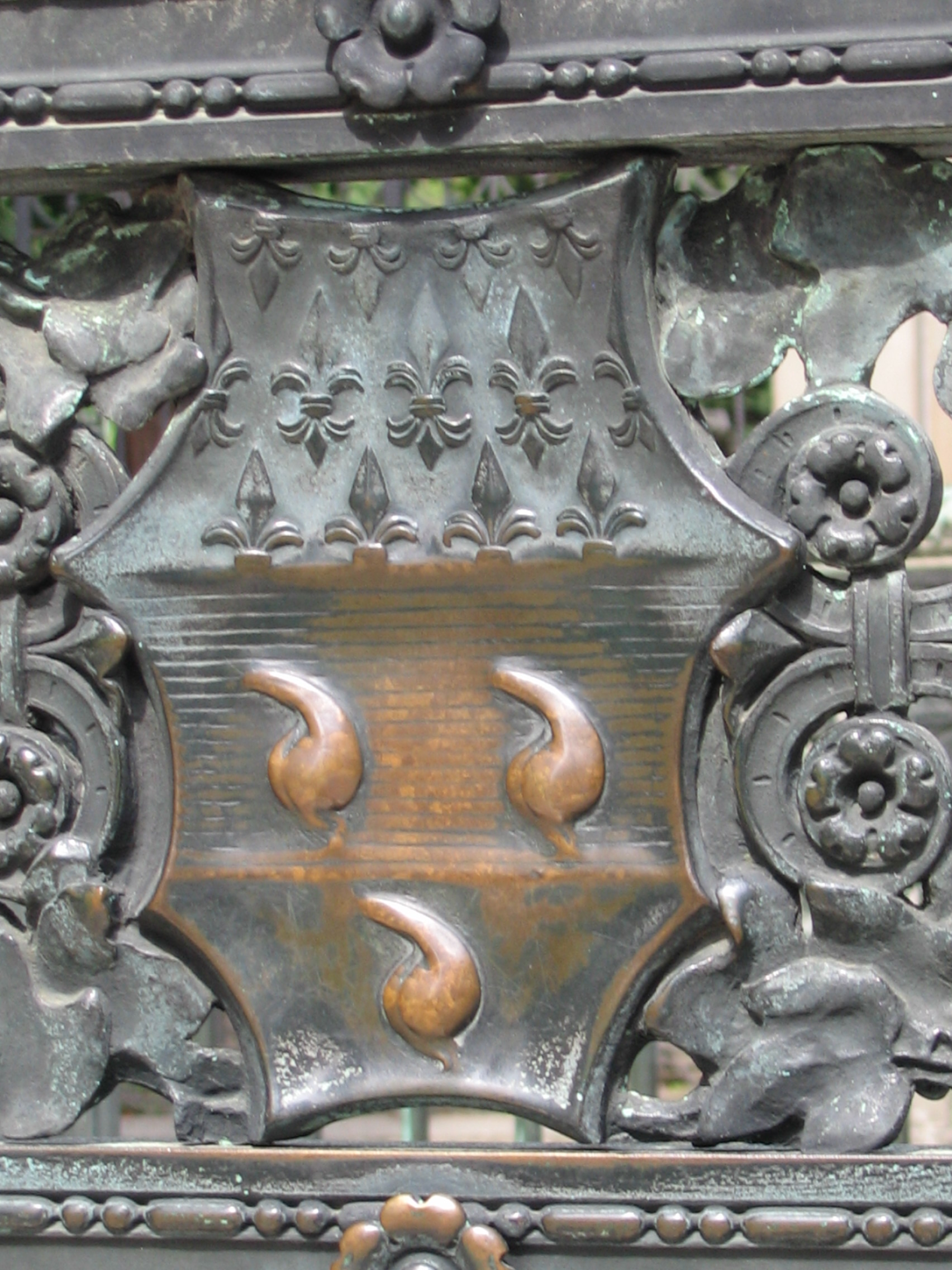 Bergamo, Cappella Colleoni, stemma della famiglia Colleoni, particolare della recinzione. Fotografia di Giorces.